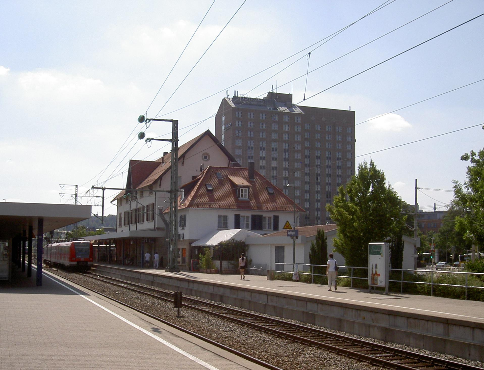 Bahnhof Stuttgart-Vaihingen